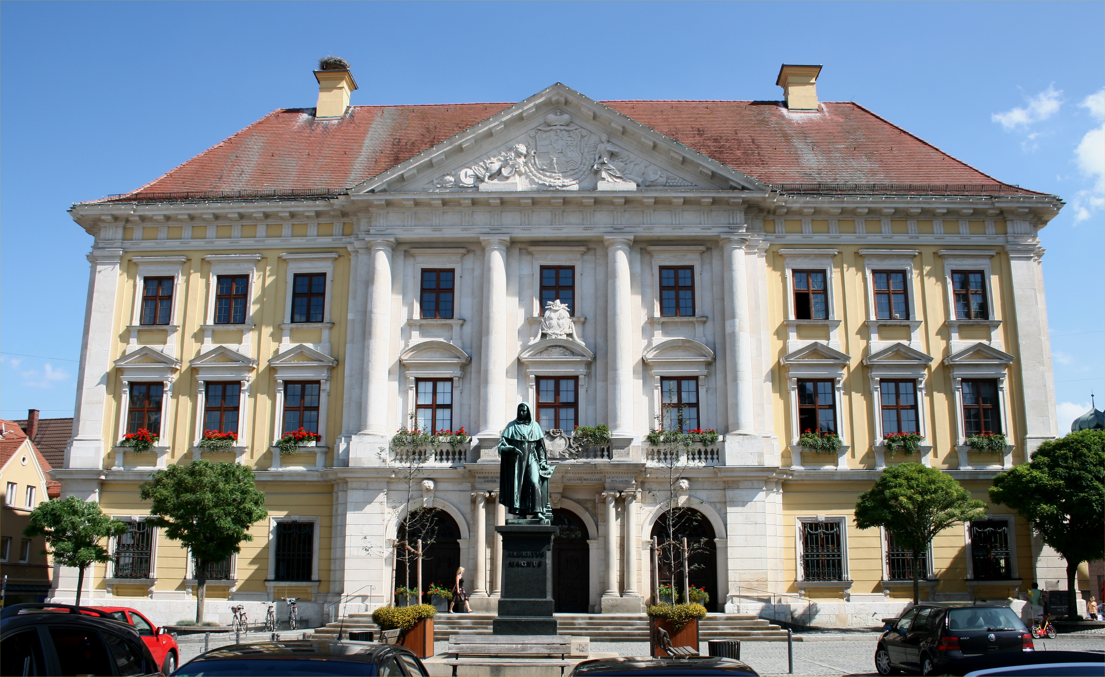 Rathaus in Lauingen im Landkreis Dillingen mit Wappen des Kurfürsten Carl Theodor von Bayern, vor dem Rathaus das Albertus-Magnus-Denkmal